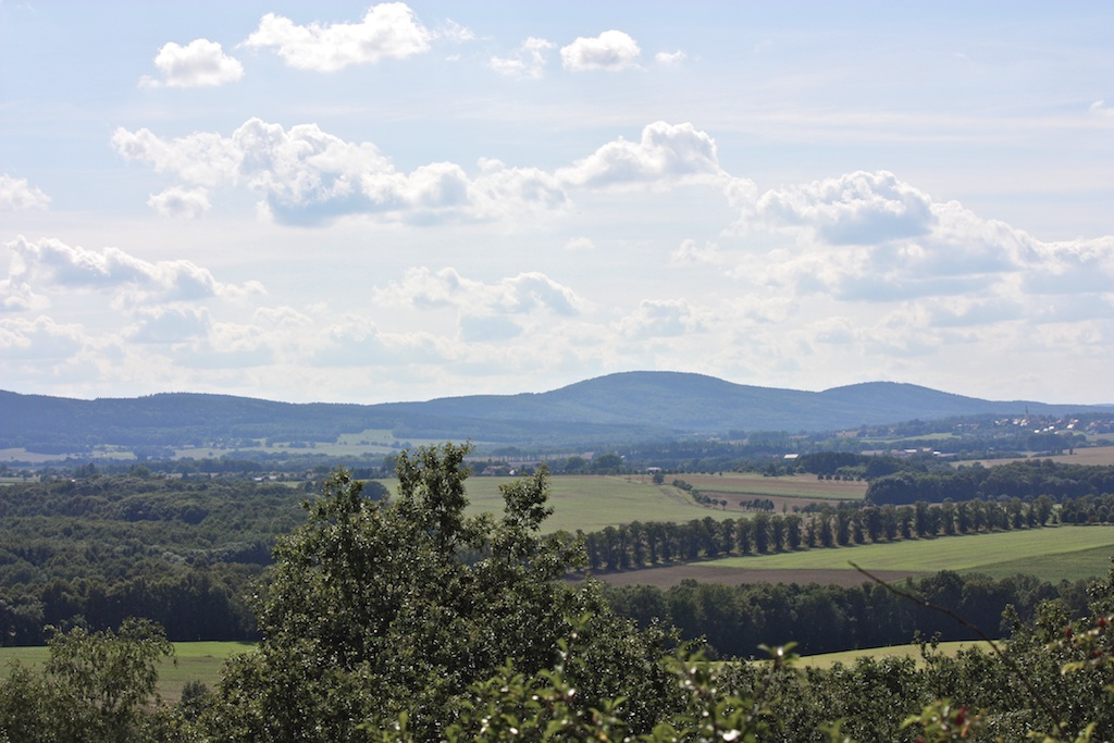 Blick vom Gipfel des Strohmbergs auf die Czornebohkette in Sachsen, Deutschland Hornjoserbsce: Pohlad wot wjerška Wósmužoweje hory na Čornobóh.